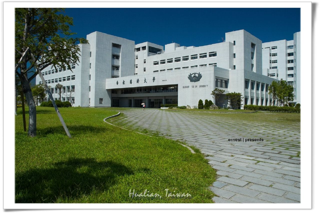 佛教慈濟大學。